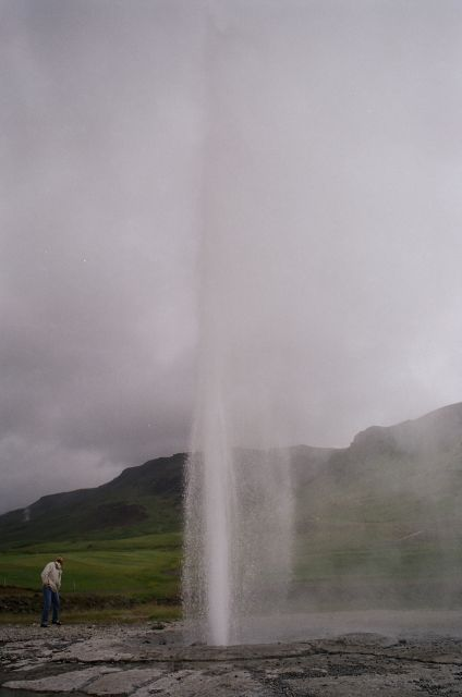 il geyser attivo a Hveragerði (sudovest Islanda). Foto scattata agli inizi di luglio 2004.